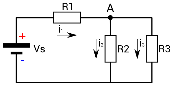 Kirchhoffi I seaduse näide